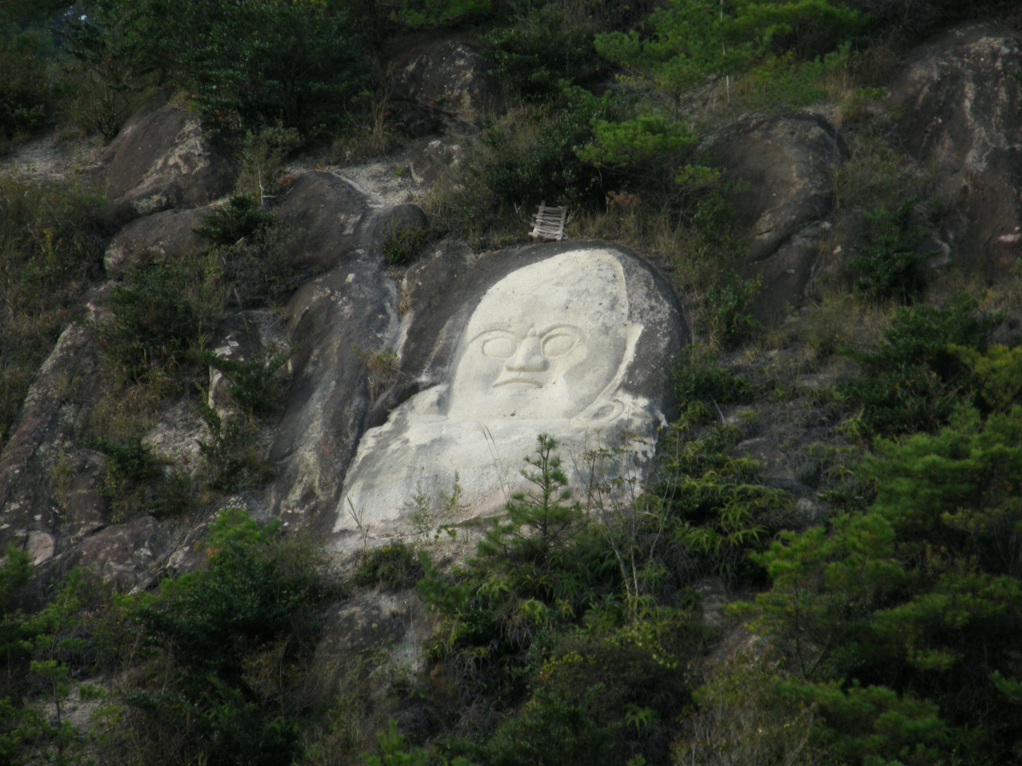 Kasai-Furubokke-nature park 古法華自然公園 加西市 磨崖仏 加西市